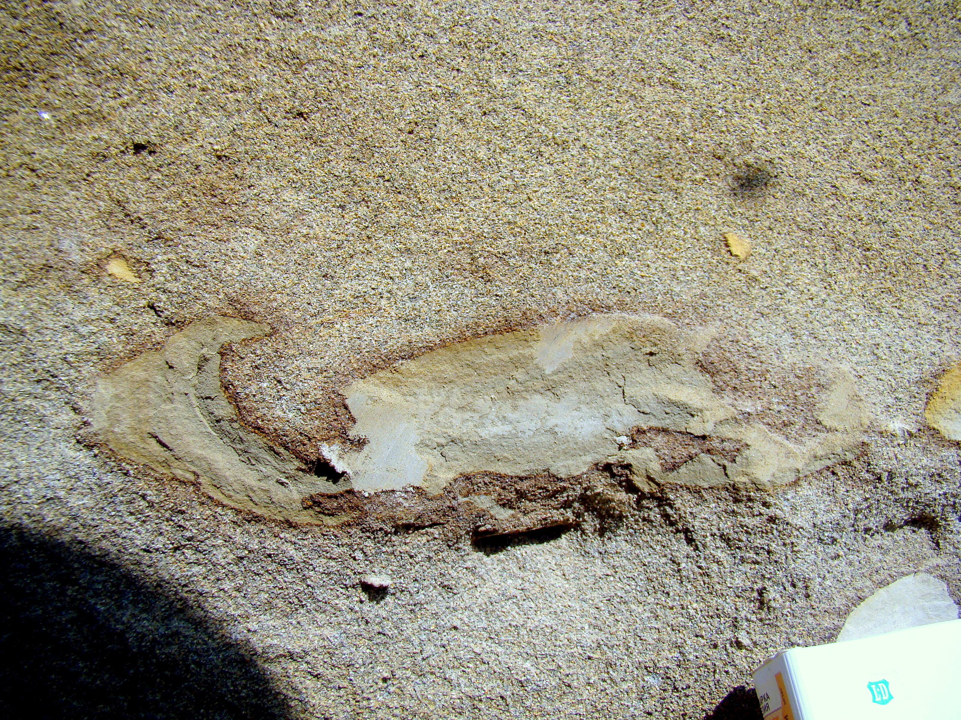 Хорошо сортированные пески и суглинки в разрезе Беле, Телецкое озеро, Алтай